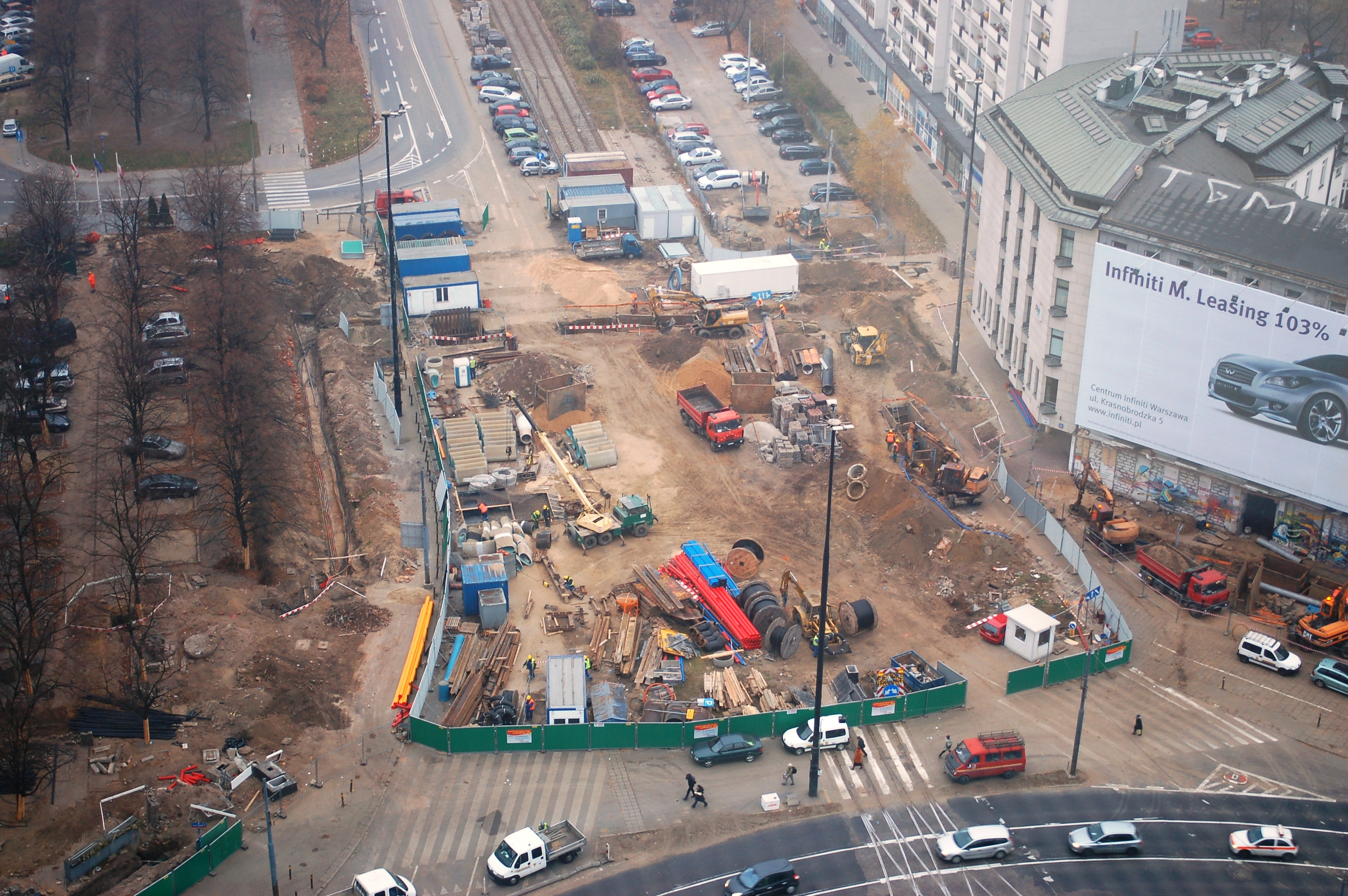 Metro construction, Warsaw